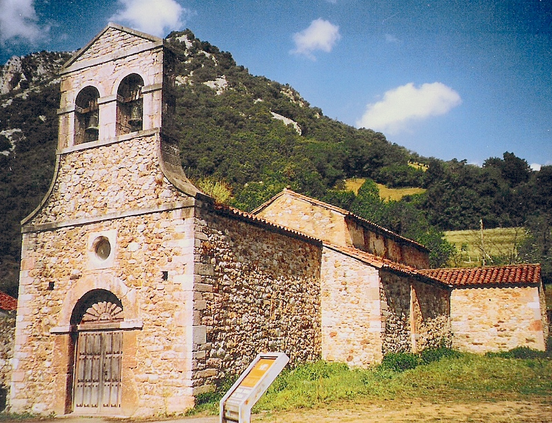 Tuñón - Església de Sant Adrià, pre-romànica, de l´època d´Alfons III. També es feia servir com a fortalesa.A la seva capella major, apareixen les primeres pintures mossàrabs en Espanya. Iglesia de Sato Adriano de Tuñón.